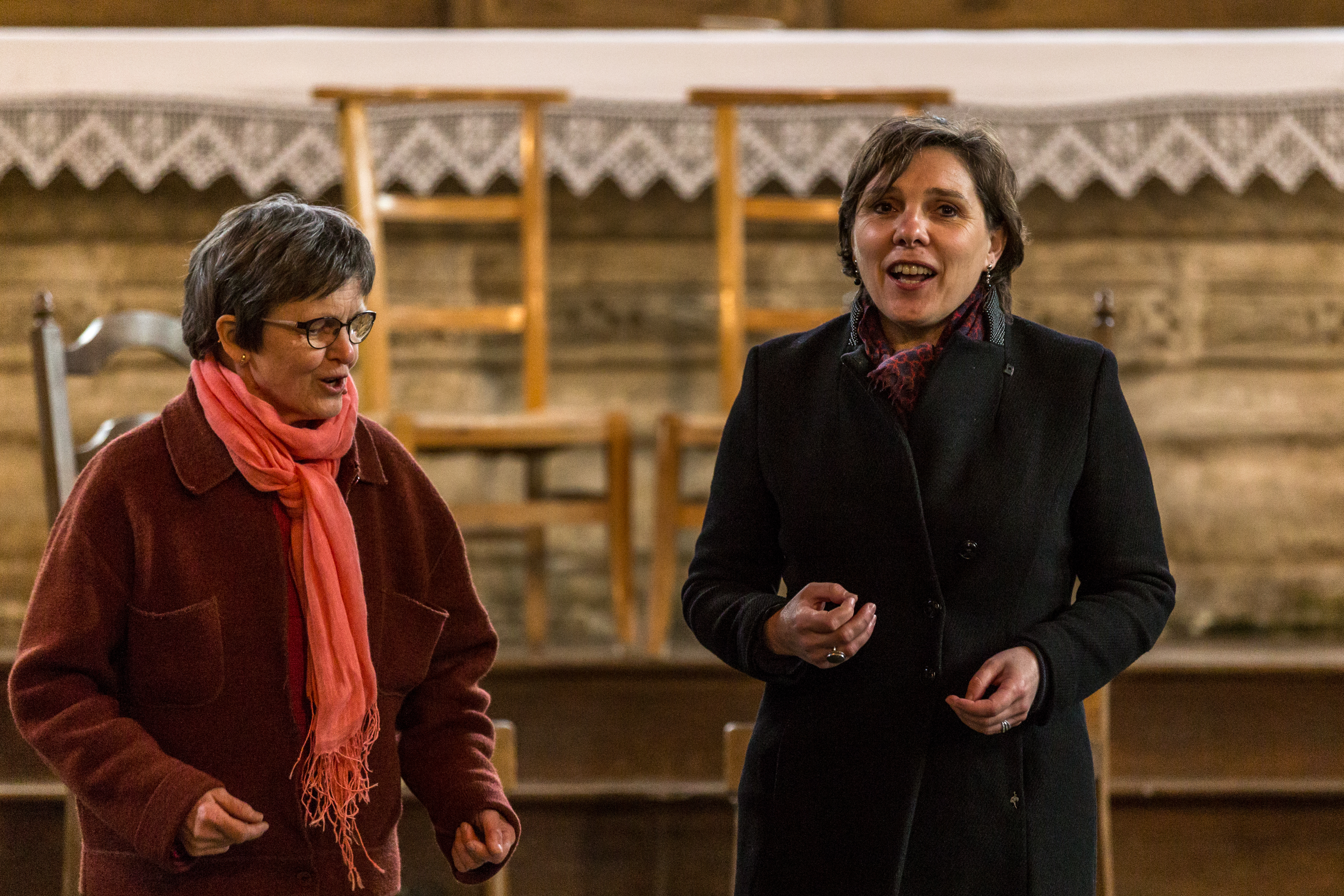 Anne Auffret et Annie Ebrel en concert dans l'église Saint-Envel de Loc-Envel pour la Rando Muco le 24 avril 2016.